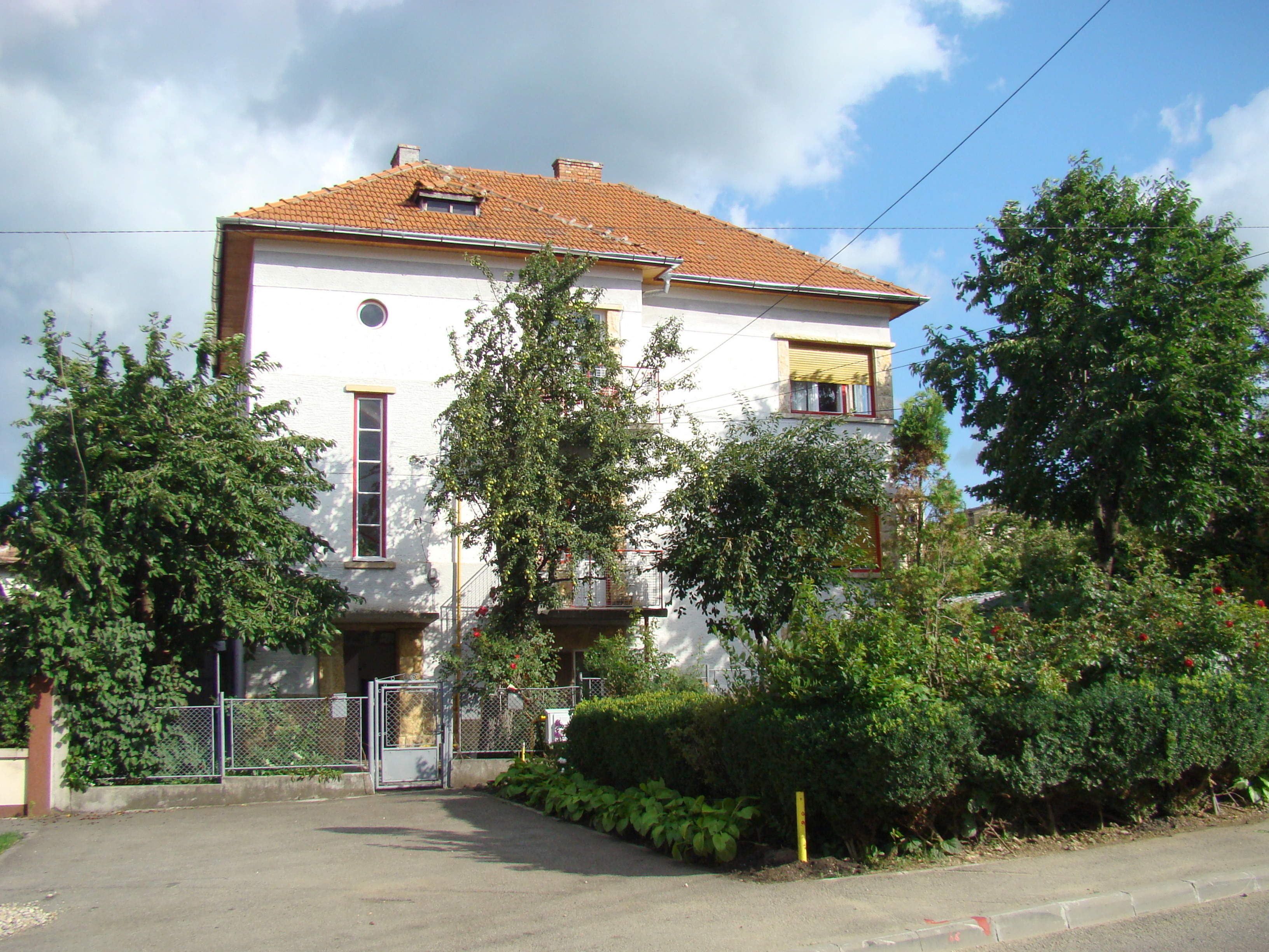 Clădire monument istoric, str.Măcinului, nr.20 (Casa în care a locuit Lucian Blaga)